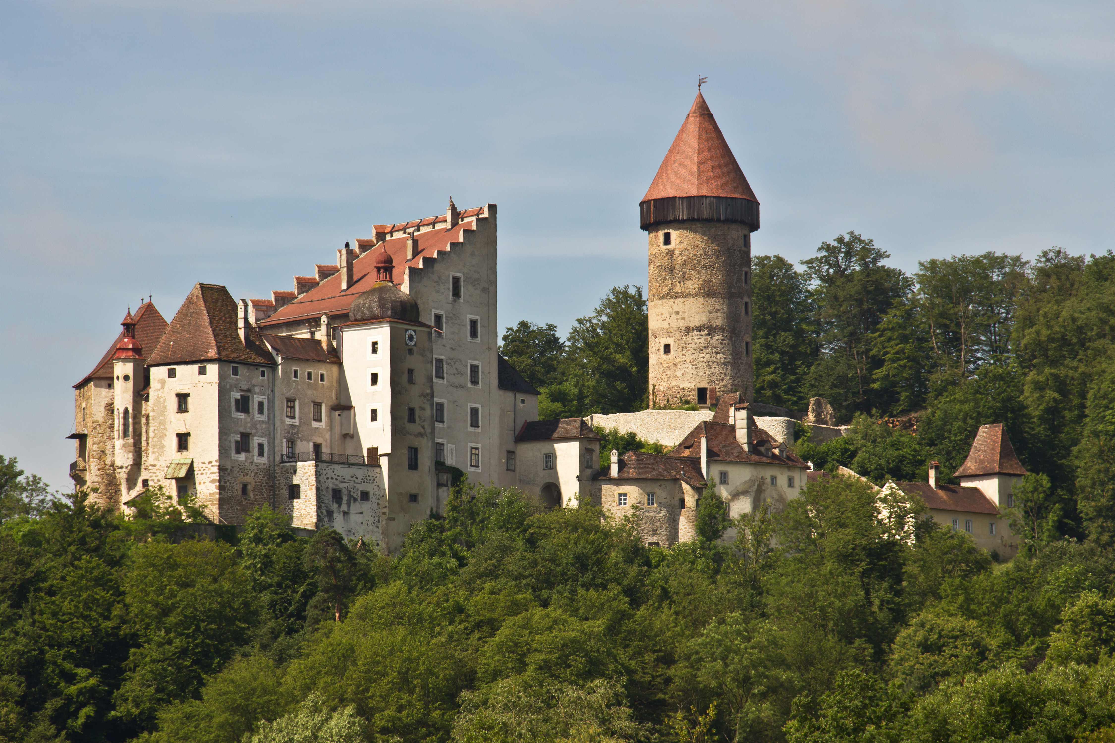 Die Burg Clam ist ein Wohnsitz der Familie Clam-Martinic und befindet sich auf dem Gemeindegebiet des Marktes Klam im Bezirk Perg im Unteren Mühlviertel in Oberösterreich. Die Burganlage steht auf einem bewaldeten Bergrücken oberhalb des Marktes Klam, der an einer Seite steil zur Klamschlucht abfällt.